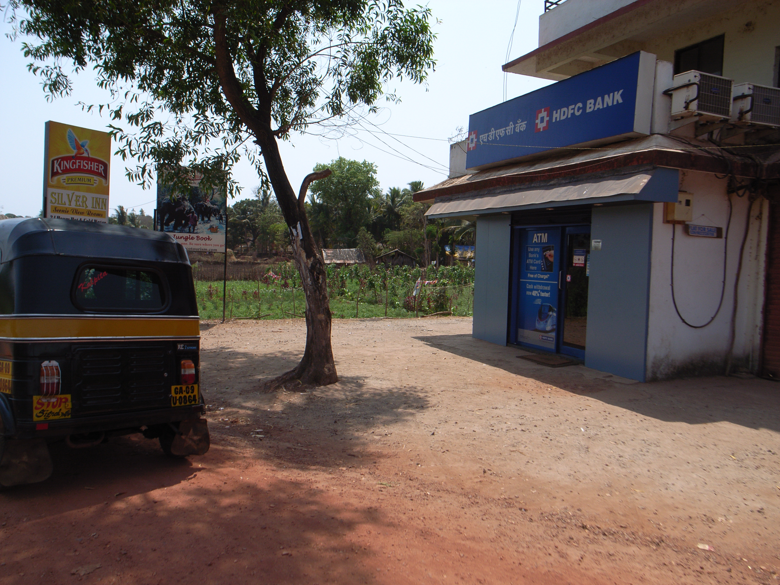 HDFC Bank ATM